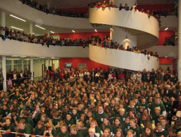 Aula des Gymnasiums Kirchseeon am 16.09.2009, 1. Schultag